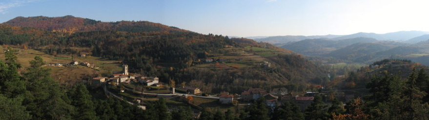 Vue générale du village